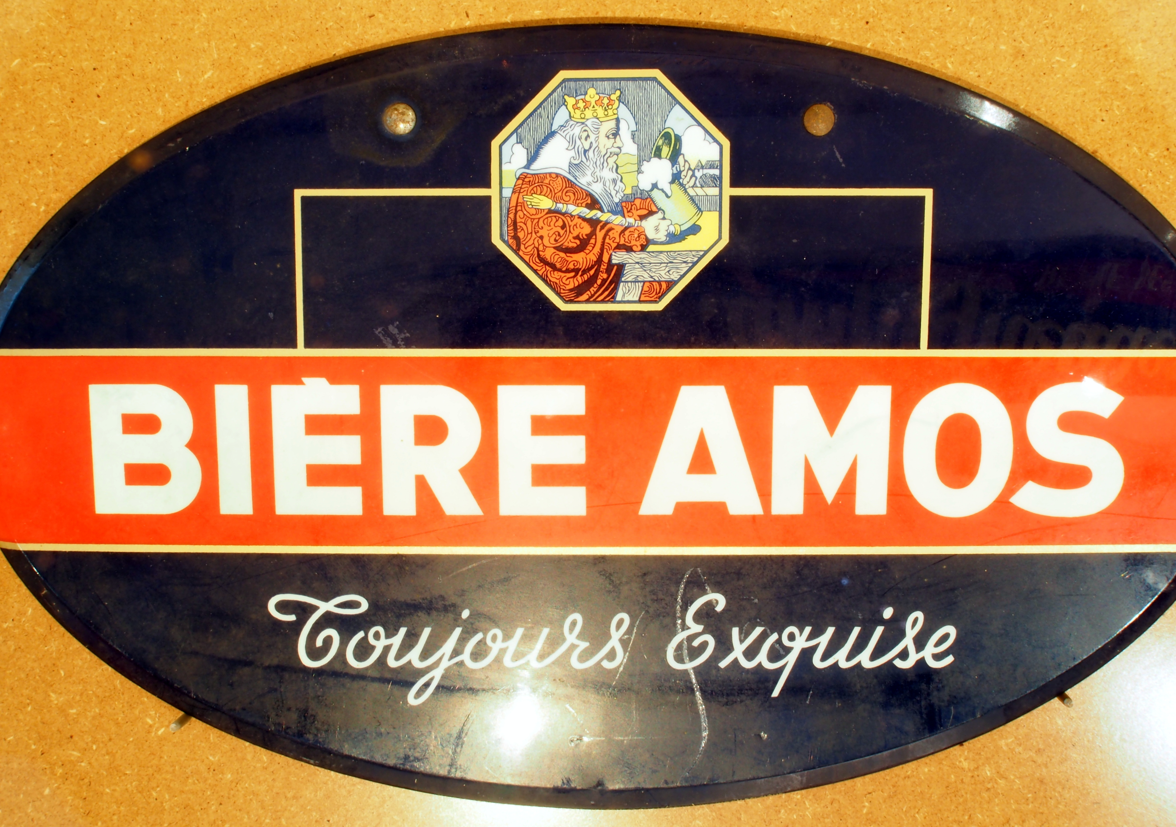 Bière Amos - Toujours Exquise, enamel advert sign at the Musée Européen de la Bière.